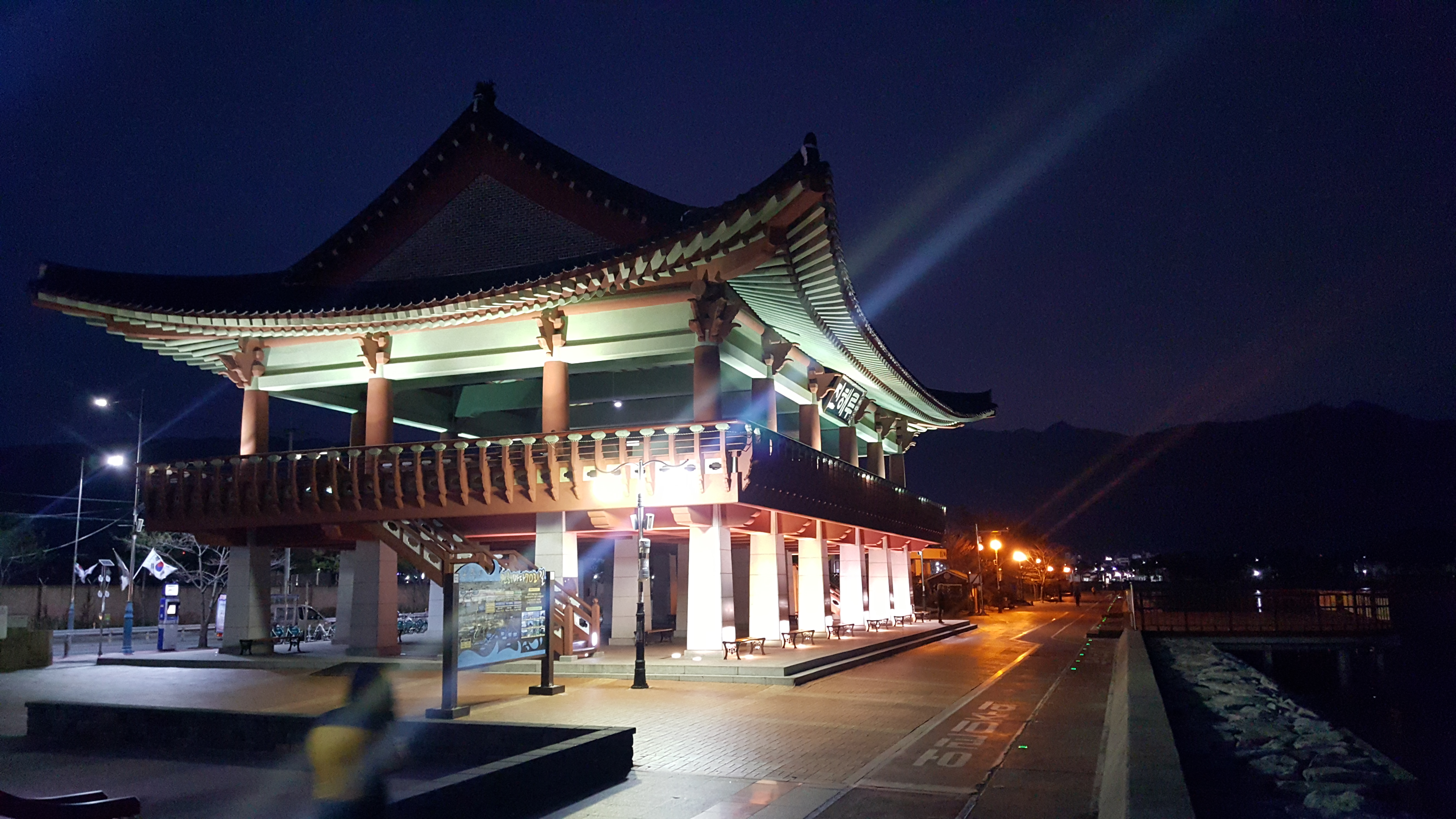 2017년 2월 진해루 야경